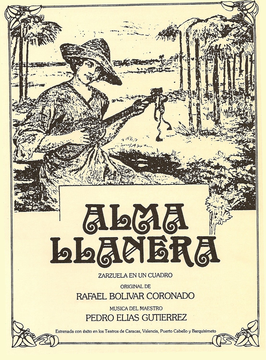 Imagen de la portada de la primera edición del libreto de Alma llanera, que escribio Rafael Bolivar Coronado.